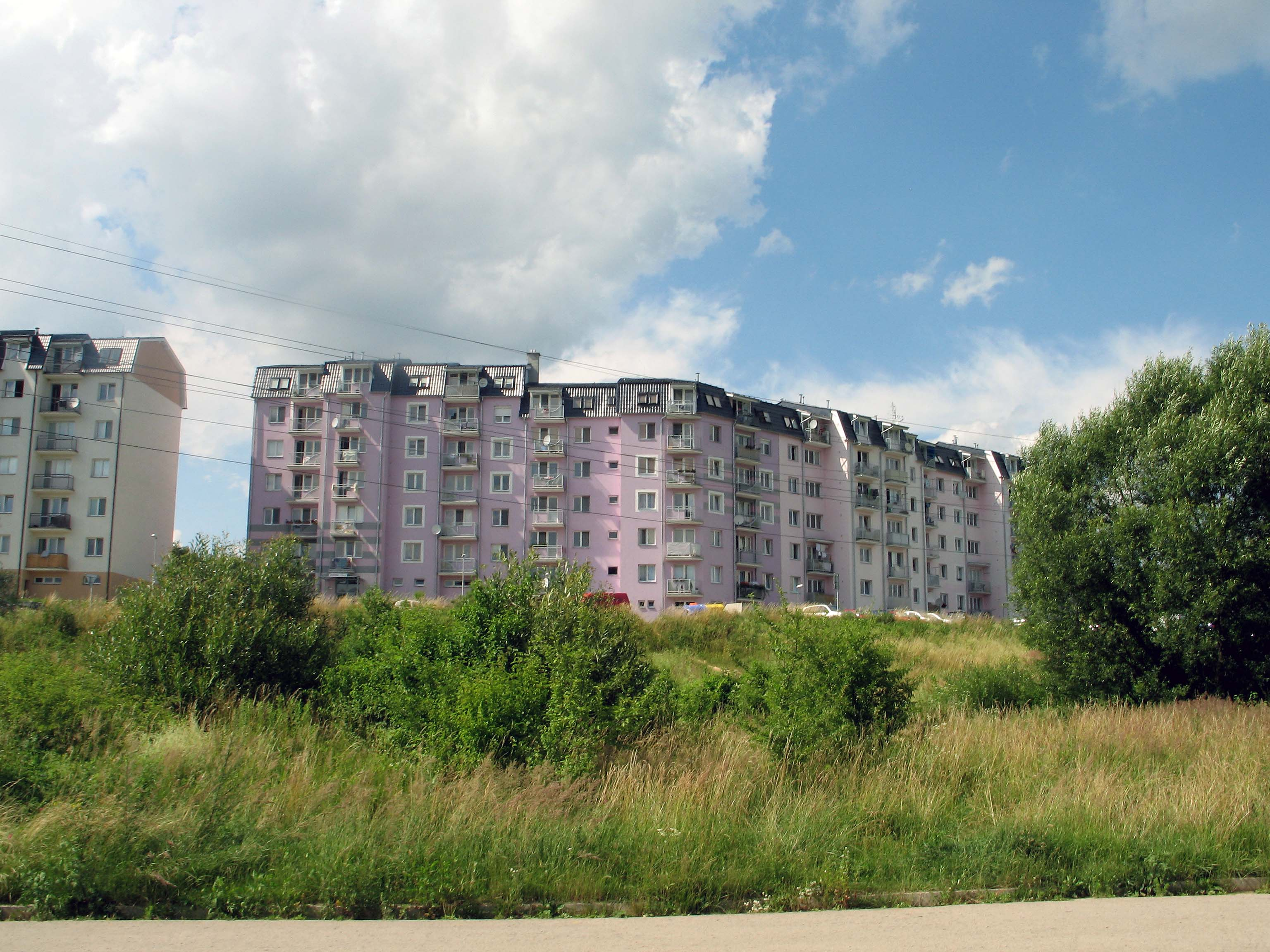 Obytné domy na sidlísku Juh Ulici Východná